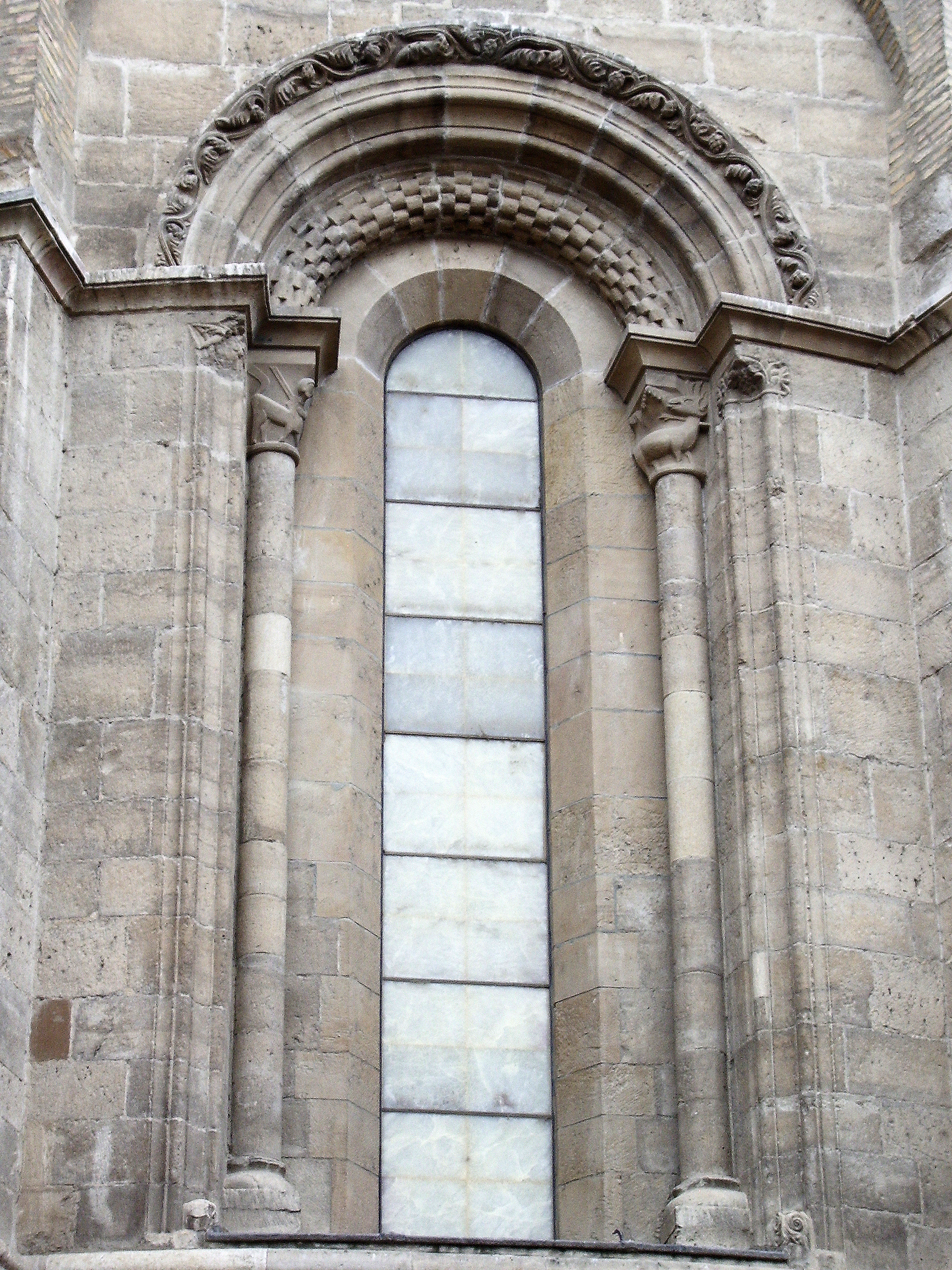 Ventana románica de La Seo (Zaragoza, España)